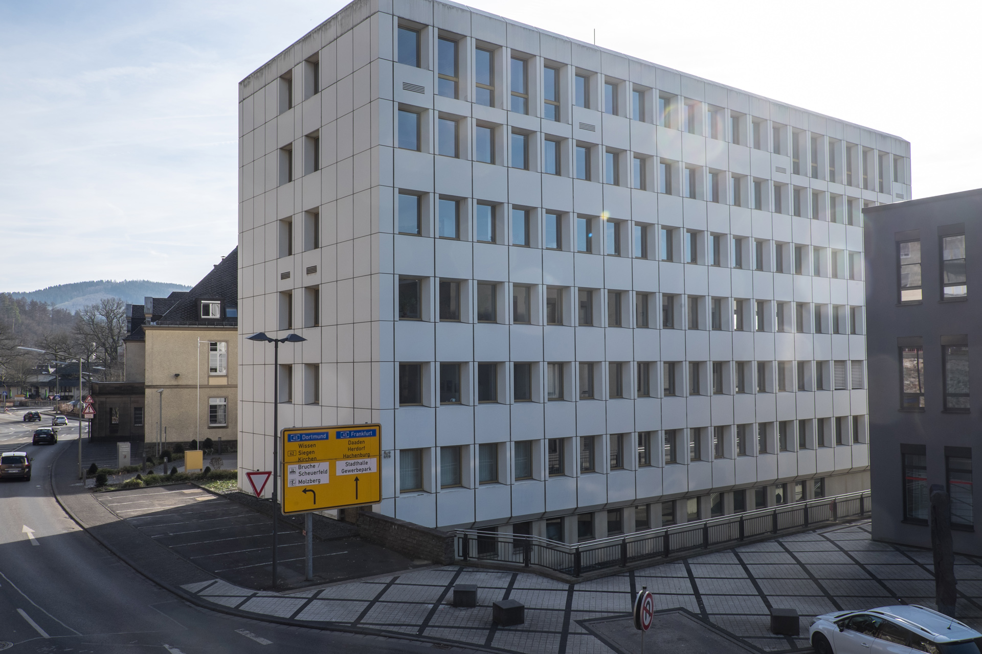 Ansicht des Amtsgericht